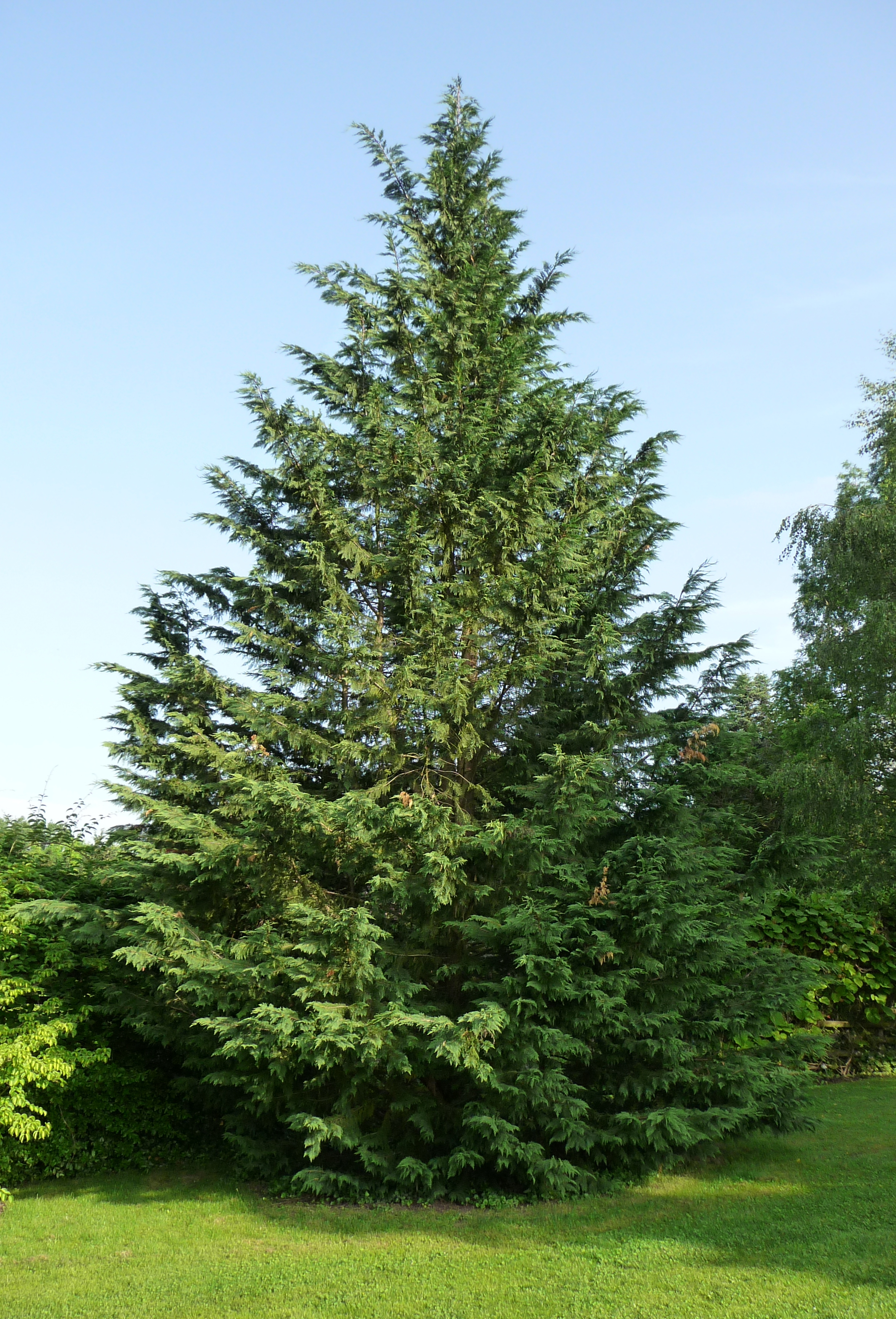 x Cupressocyparis leylandii